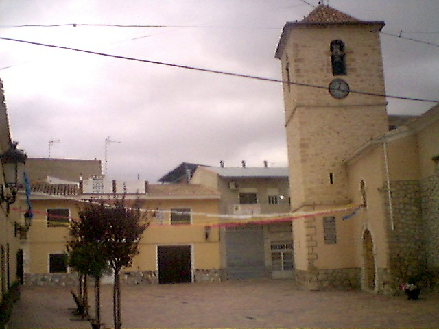 PozoLorenteAlb